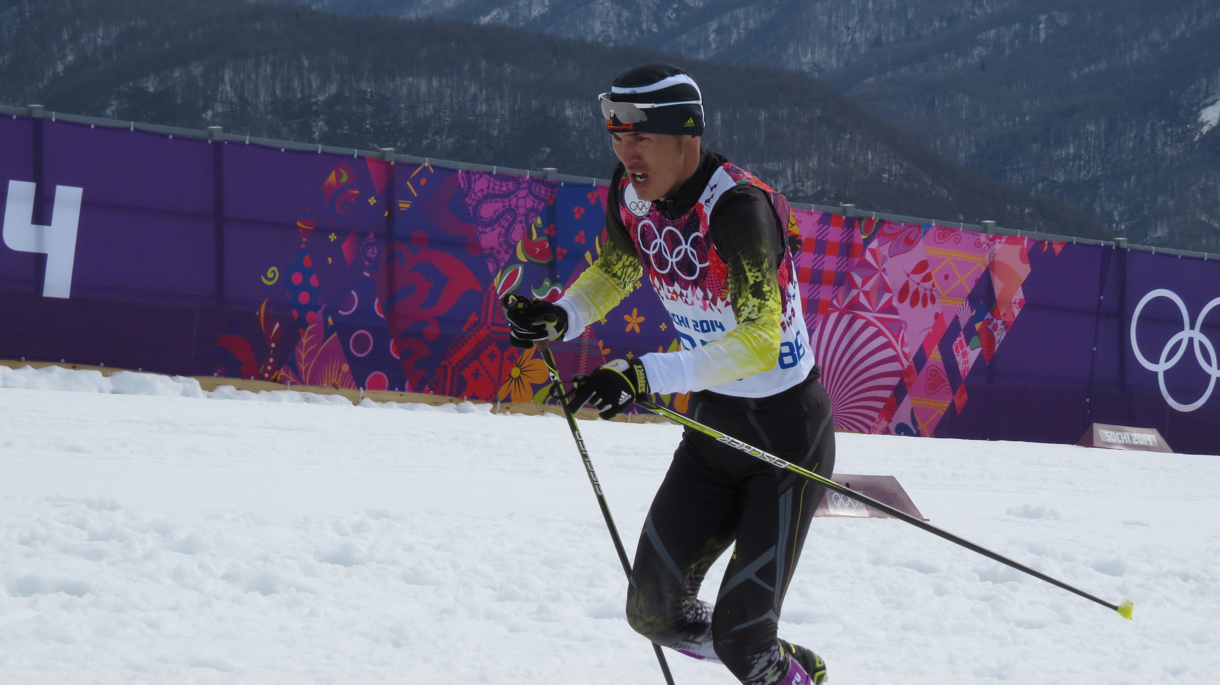 Лыжные гонки на зимних Олимпийских играх 2014 — 15 км классическим стилем (мужчины)